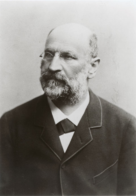 Porträtfotografie des Psychiaters Ludwig Wille (1834–1912)